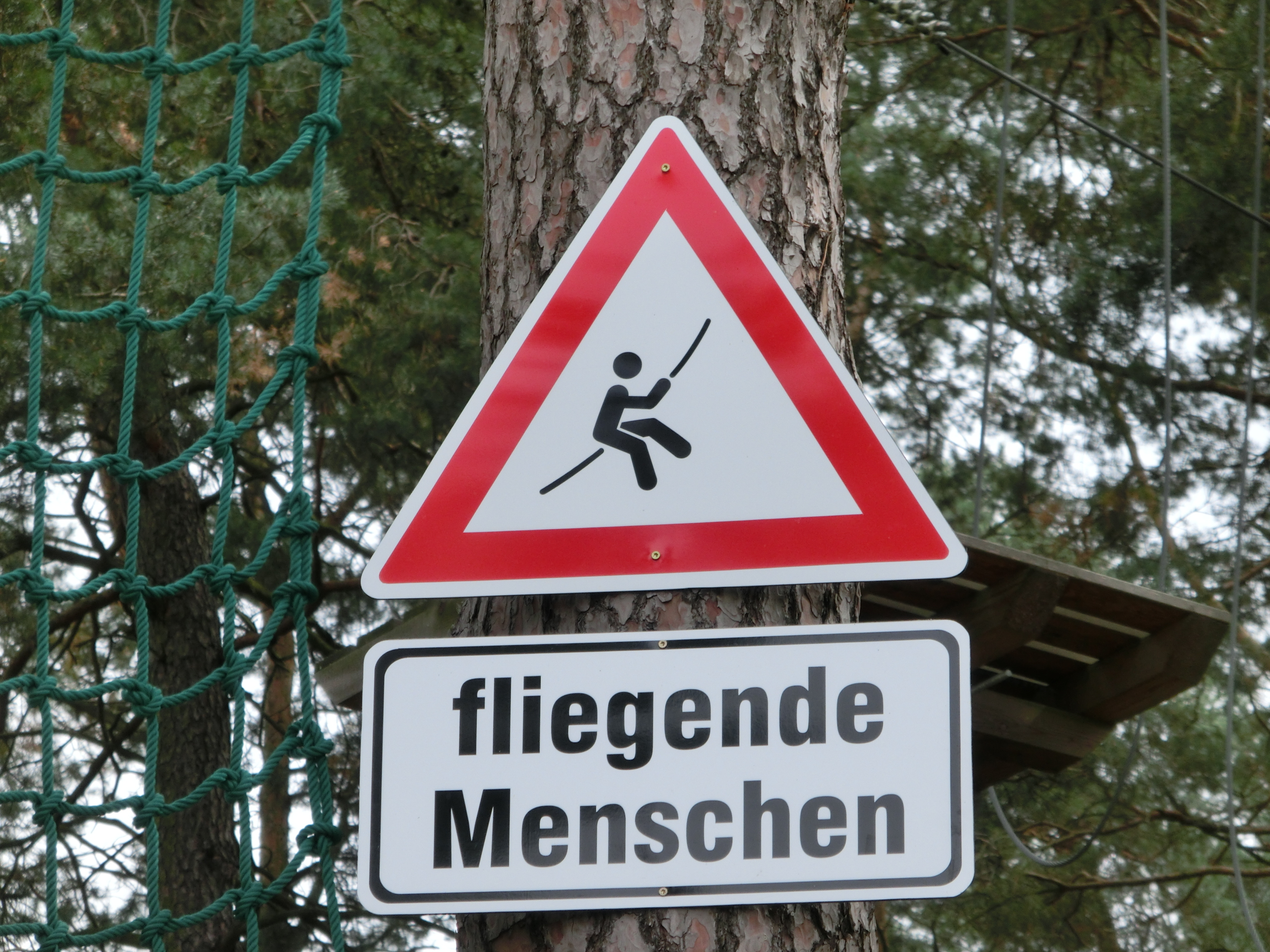 Deutschland (D) - Mecklenburg-Vorpommern (MV) - Landkreis Vorpommern-Greifswald (VG) - Ueckermünde: "Kletterwald", Warnschild